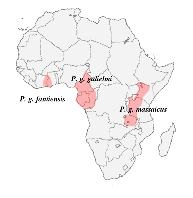 Mapa político de África, en el se encuentra señalizado el área de difusión del poicephalus gulielmi